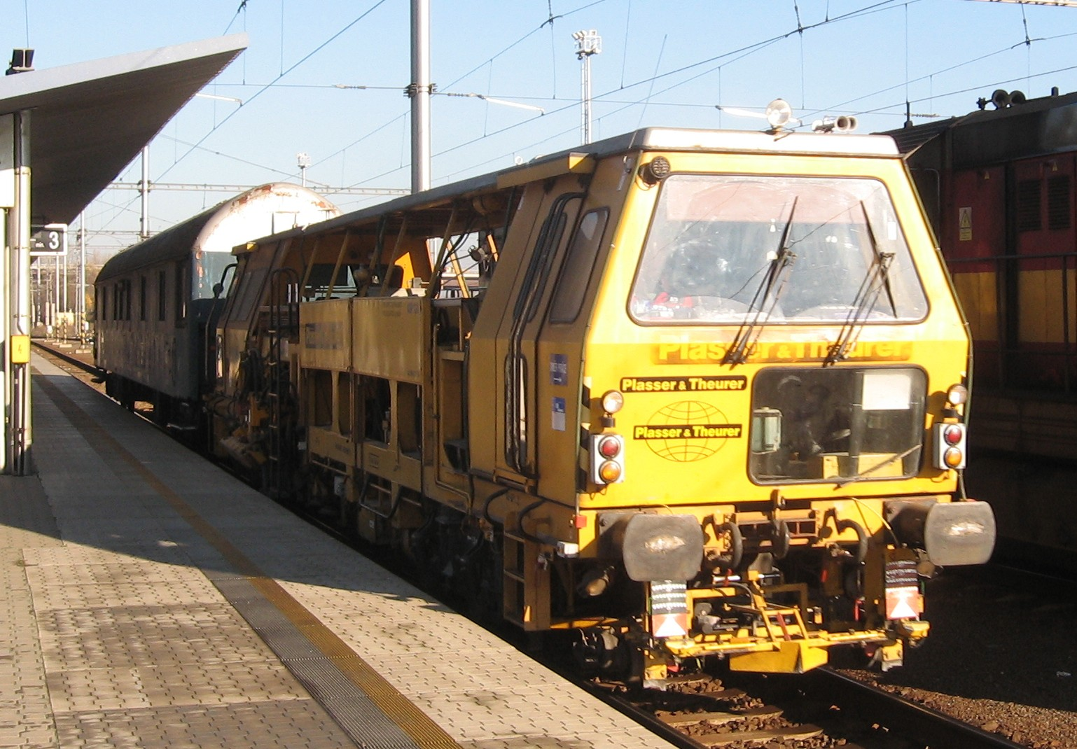 Podbíječka Plassermatic (Plasser & Theurer) projíždějící nádražím Ostrava-Svinov.